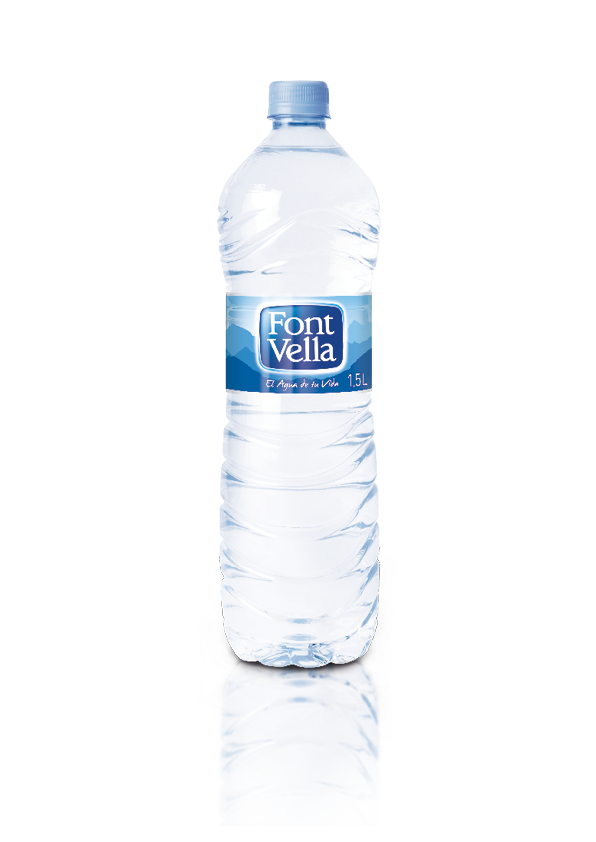 Botella de agua de la marca Font Vella